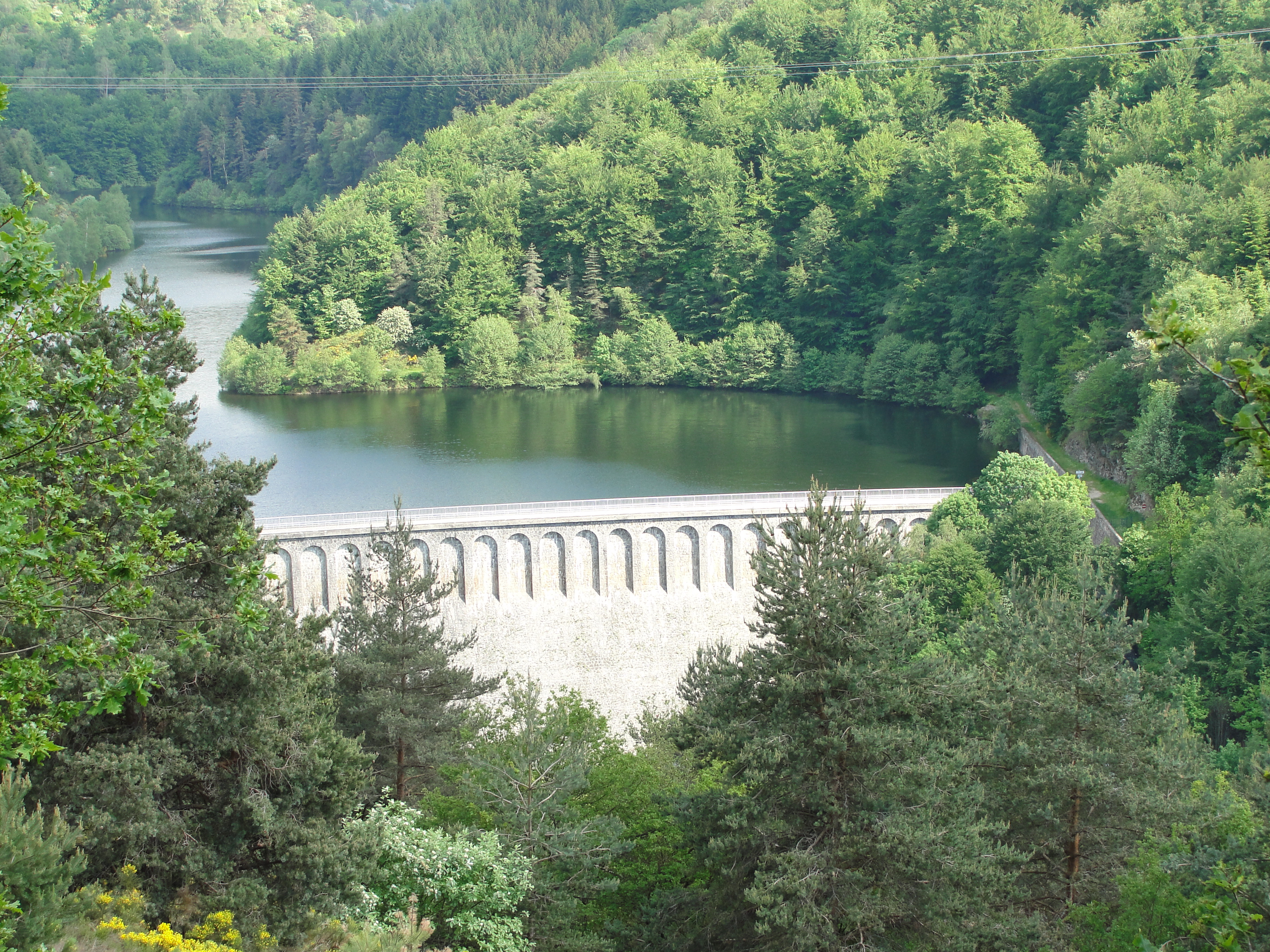 Barrage de Cotatay (Loire), entre La Ricamarie, Planfoy et St-Genest Malifaux, depuis RD33.